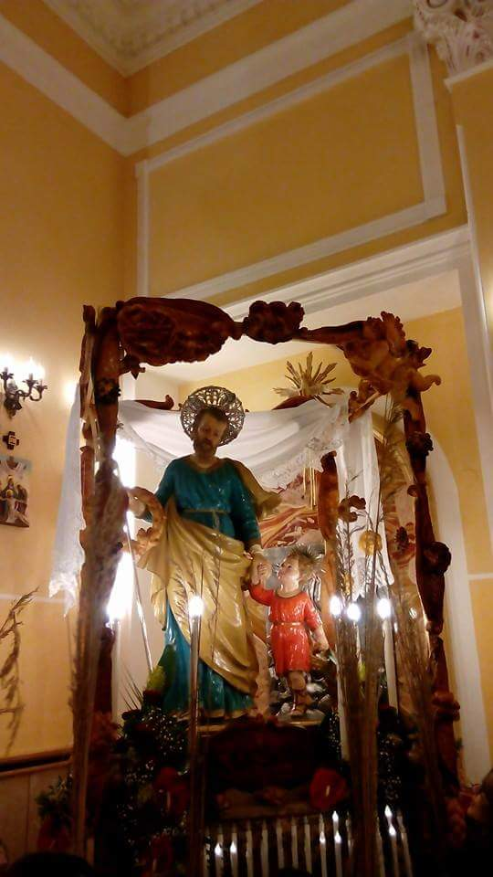 Statua di San Giuseppe, Patrono di Nizza di Sicilia con Santa Maria Assunta, durante la novena.